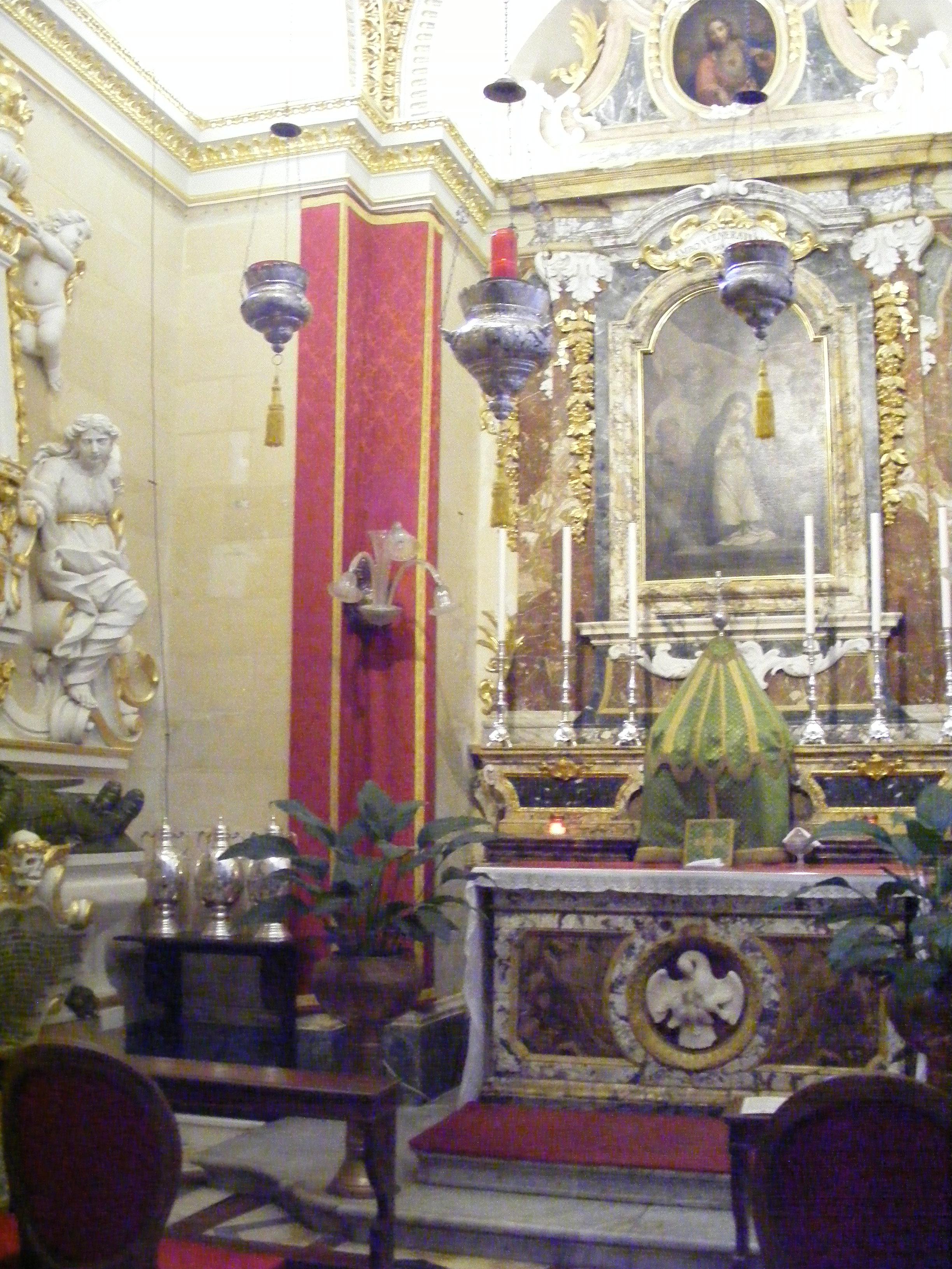 Kaplica Najświętszego Sakramentu, zwana też kaplicą Matki Boskiej Samotnej (Nuestra Señora de la Soledad); ołtarz z dziełem Francesco Zahry z 1751.